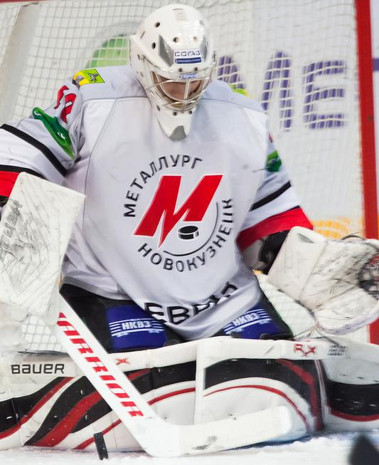 Вратарь новокузнецкого «Металлурга» Александр Лазушин во время матча чемпионата КХЛ против хабаровского «Амура» 21 ноября 2012 года.